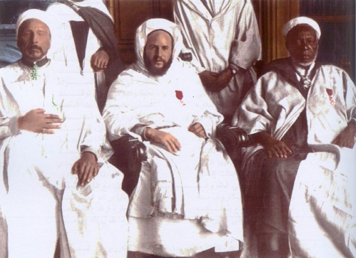 A droite, le Sheikh Abdul Hamid Kane. Au centre, le Sheikh Ahmad Al Skridj